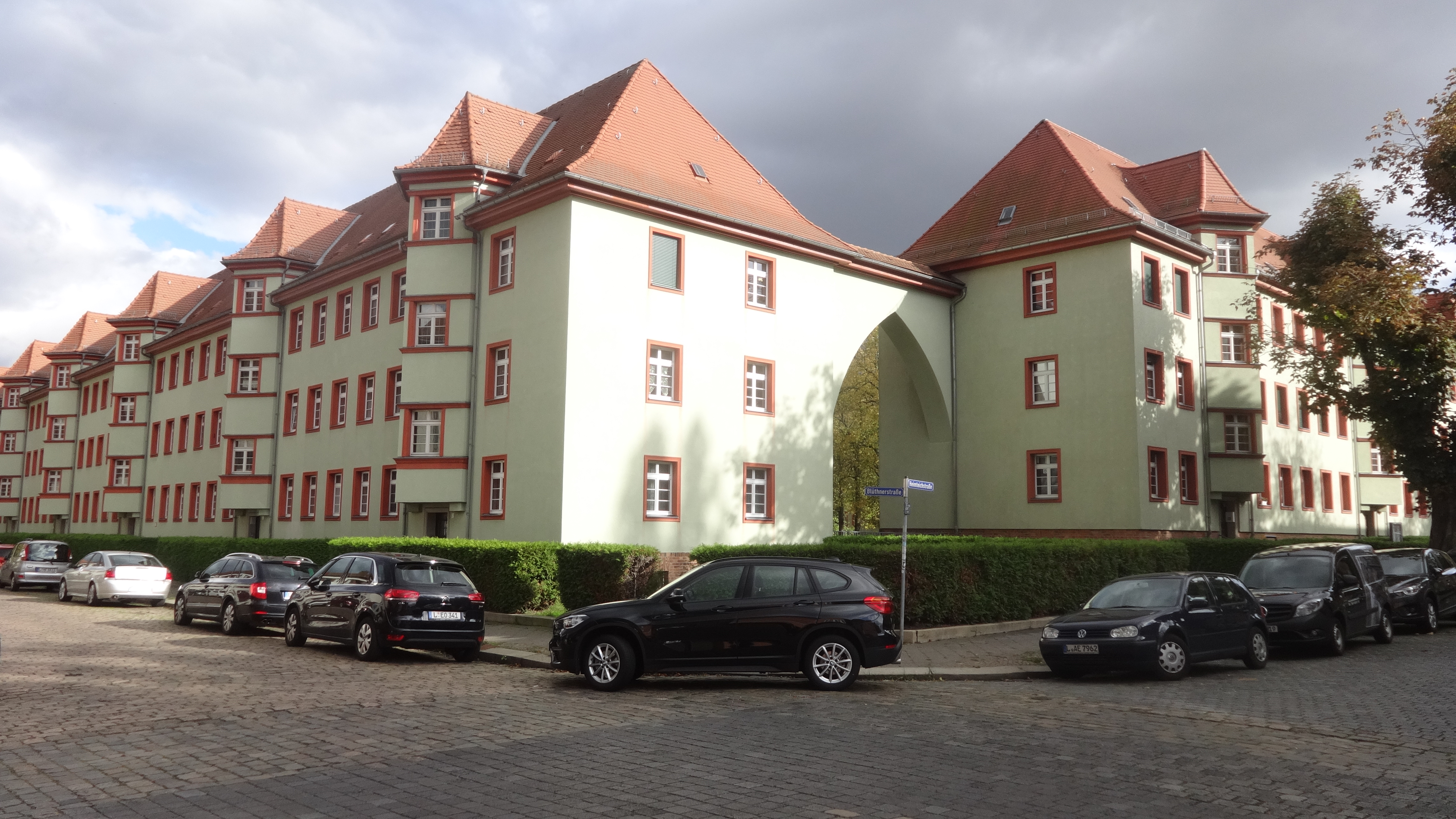 Leipzig-Leutzsch, Ecke Heimteich- und Blüthnerstraße, Wohnanlage (1920er/30er Jahre)